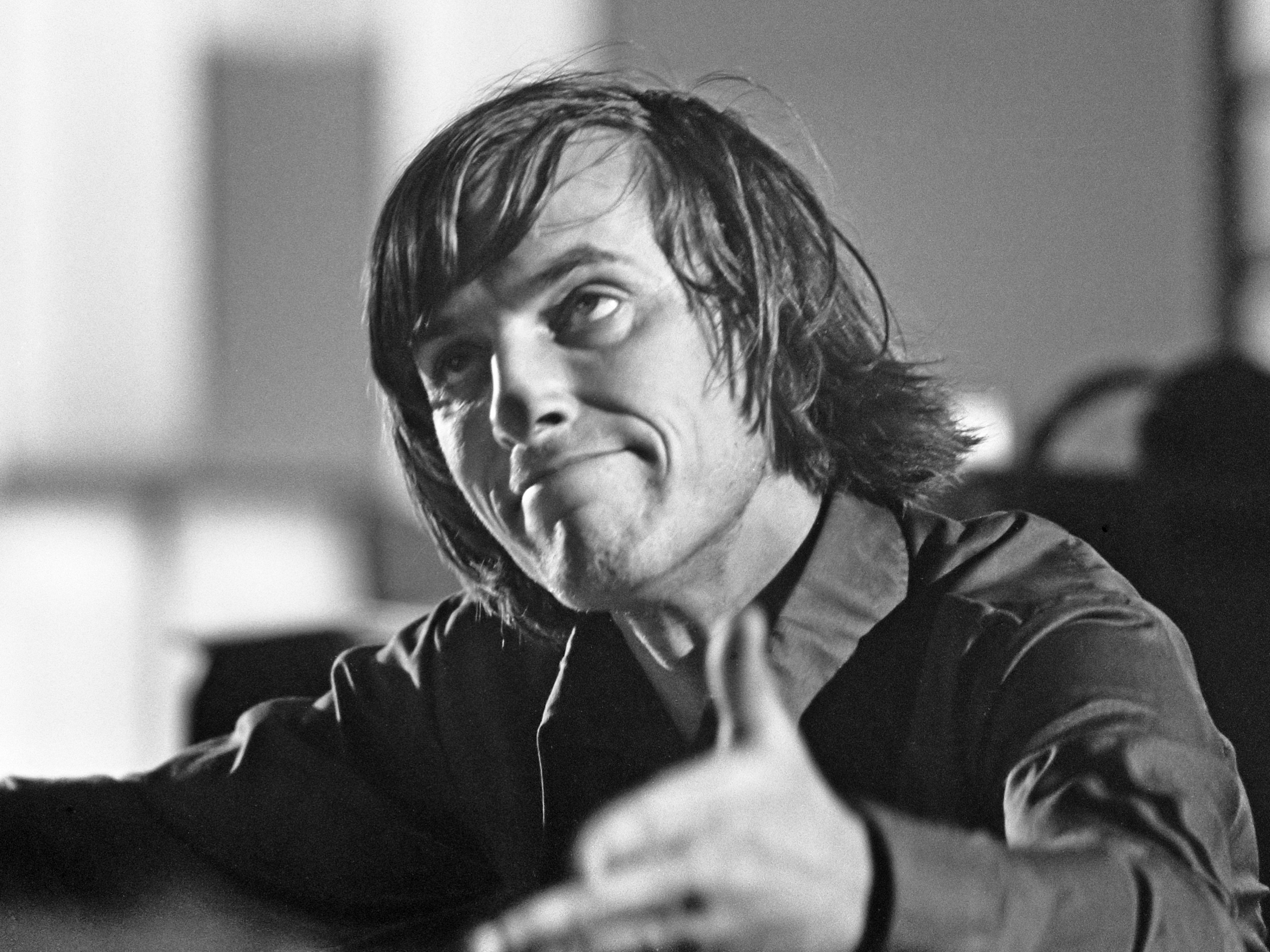 Opnamen voor de laatste uitzending van 'Music All In' (TROS televisieprogramma); orkestleider Rogier van Otterloo 14 mei 1975